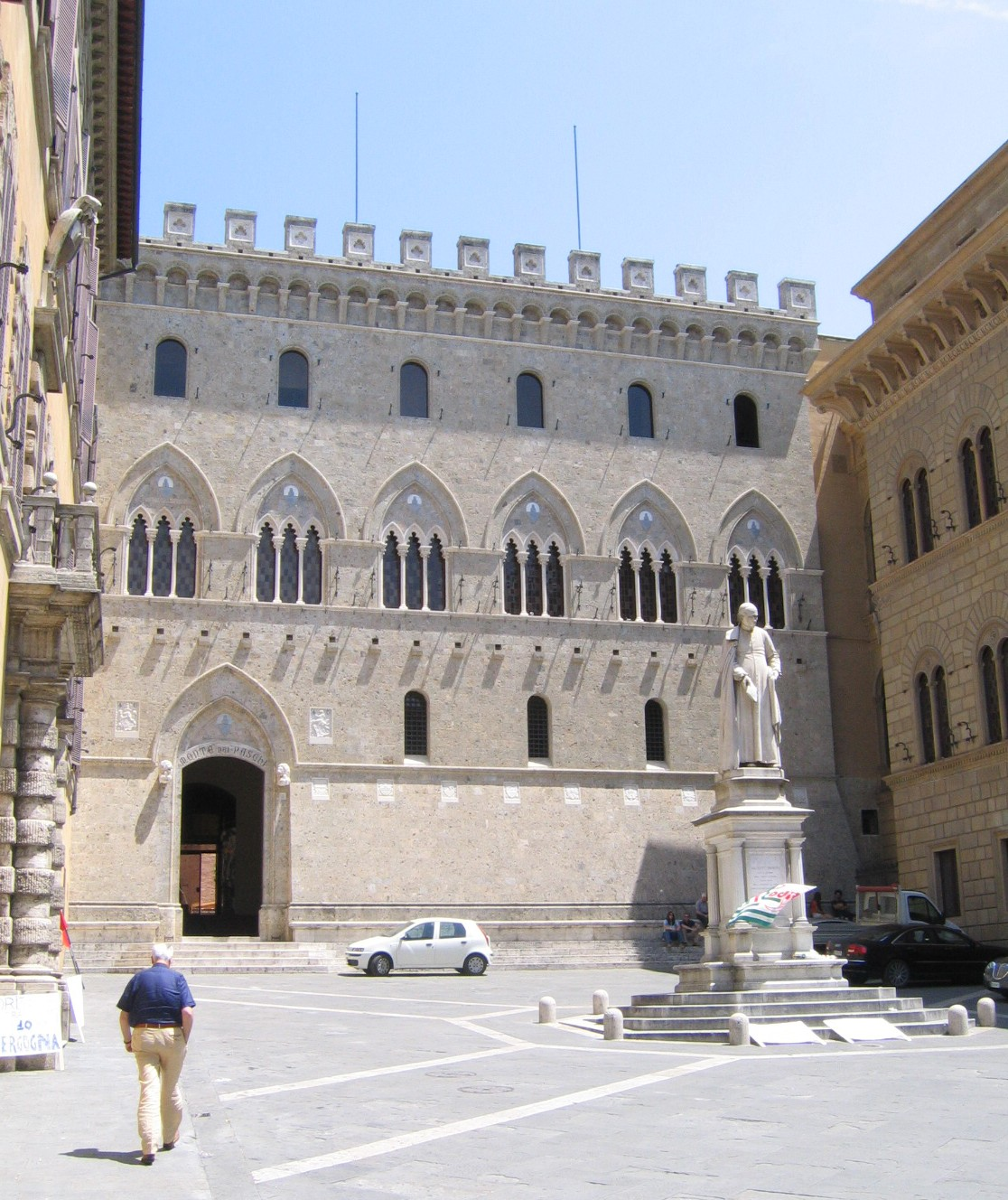 Palazzo Salimbeni, Siena, Italy